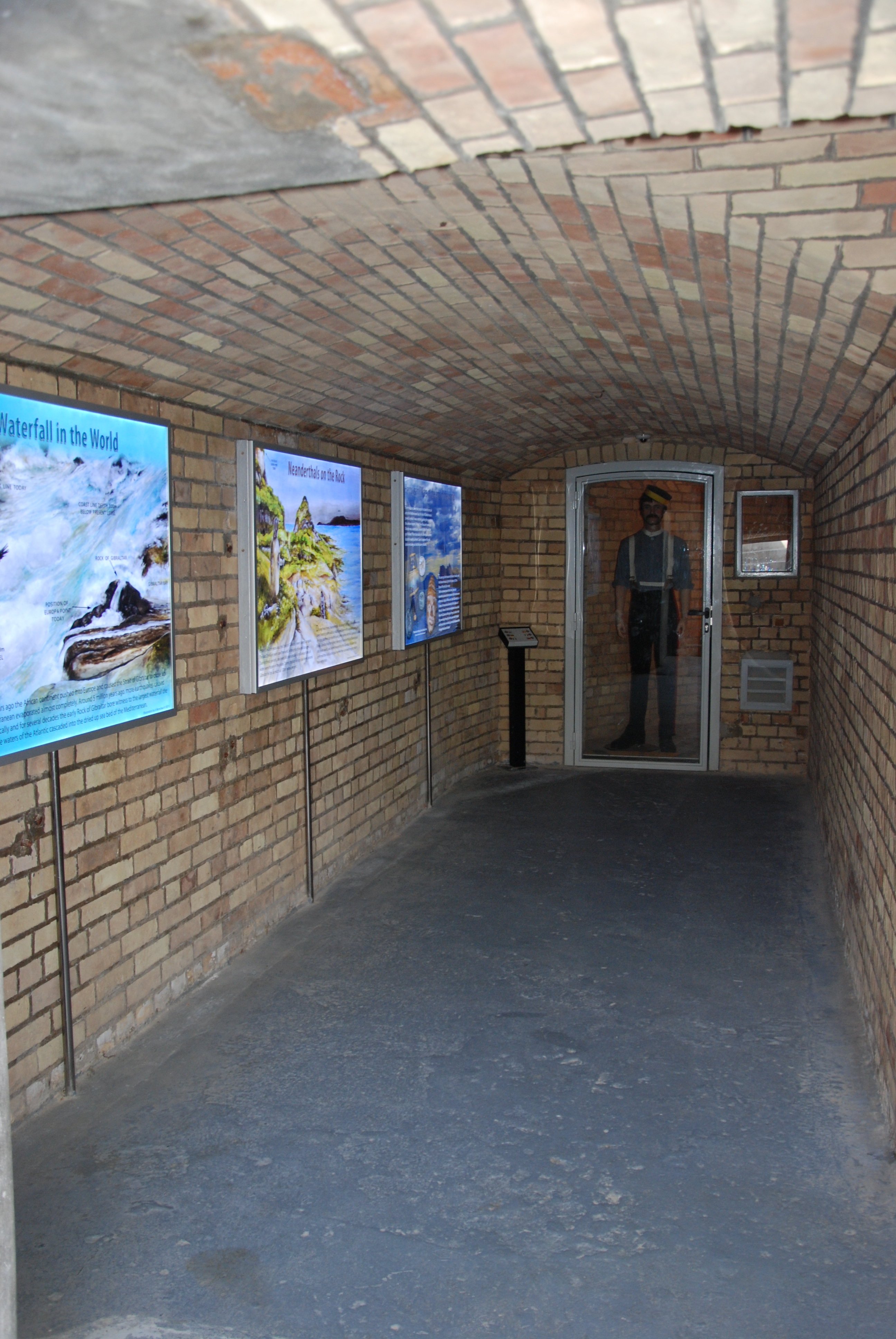 HARDINGS BATTERY GIBRALTAR